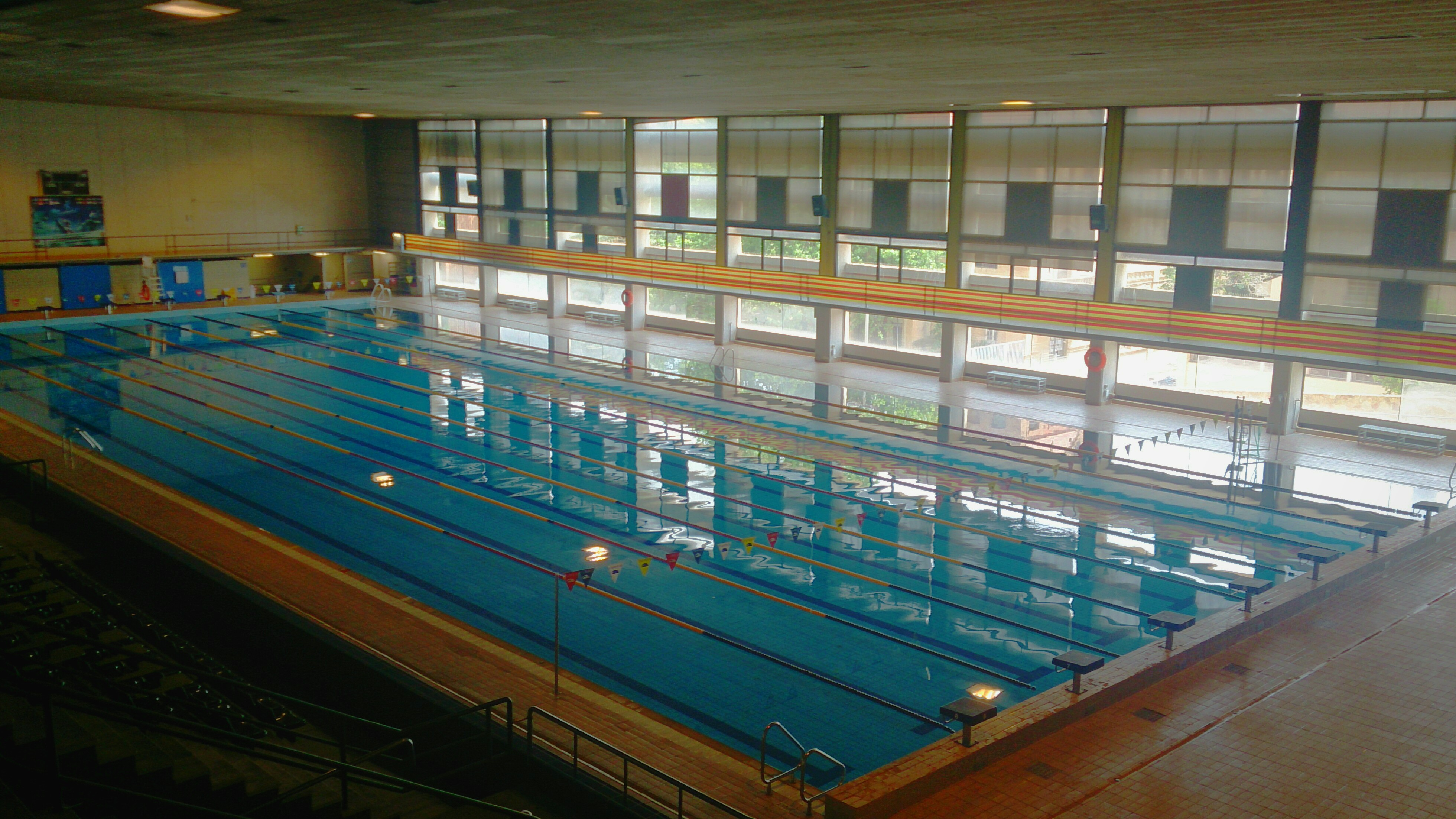 Interior de la Piscina Sant Jordi de Barcelona. Largada de 50 metros.